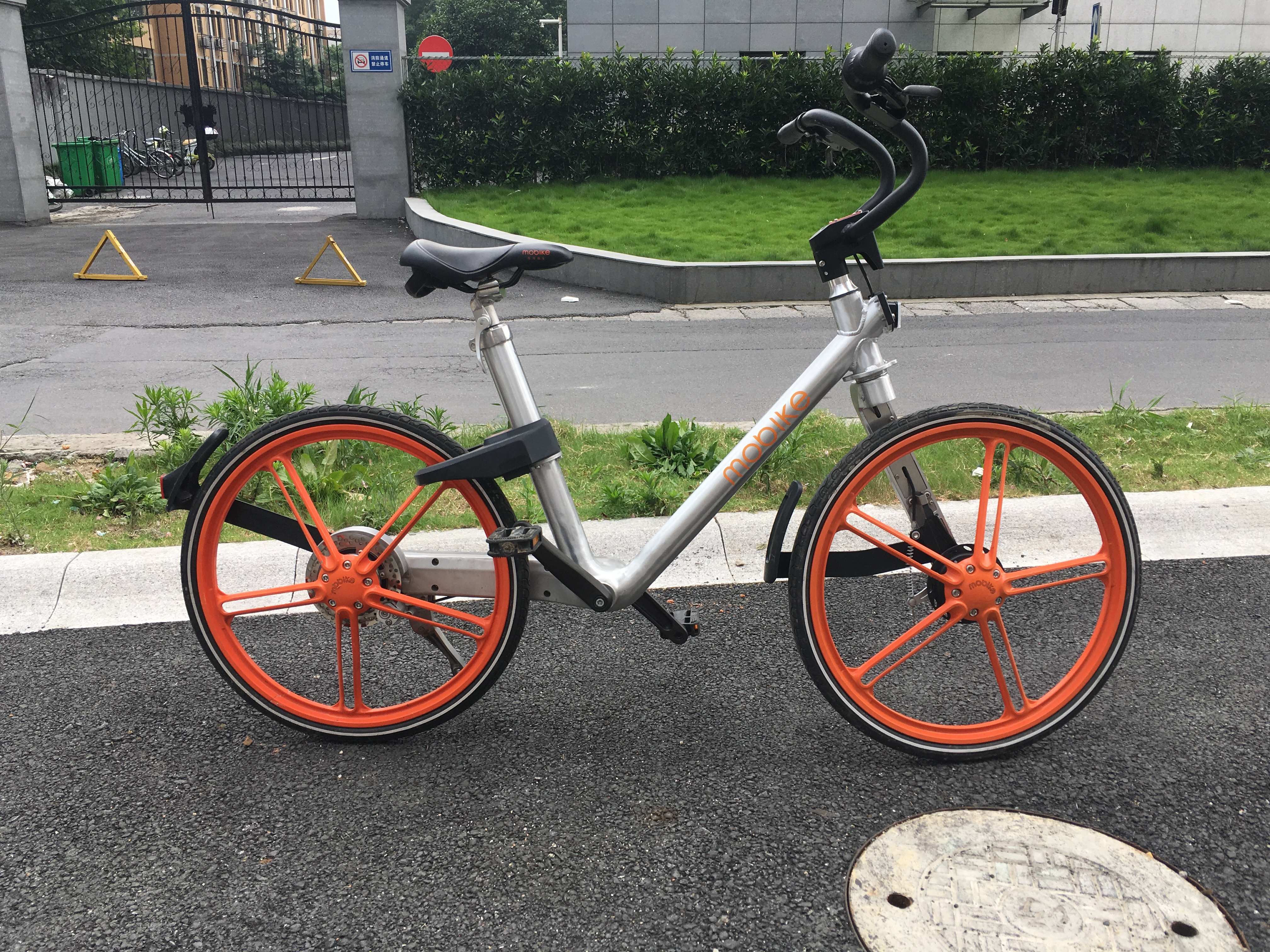 一部摩拜经典款第三代单车